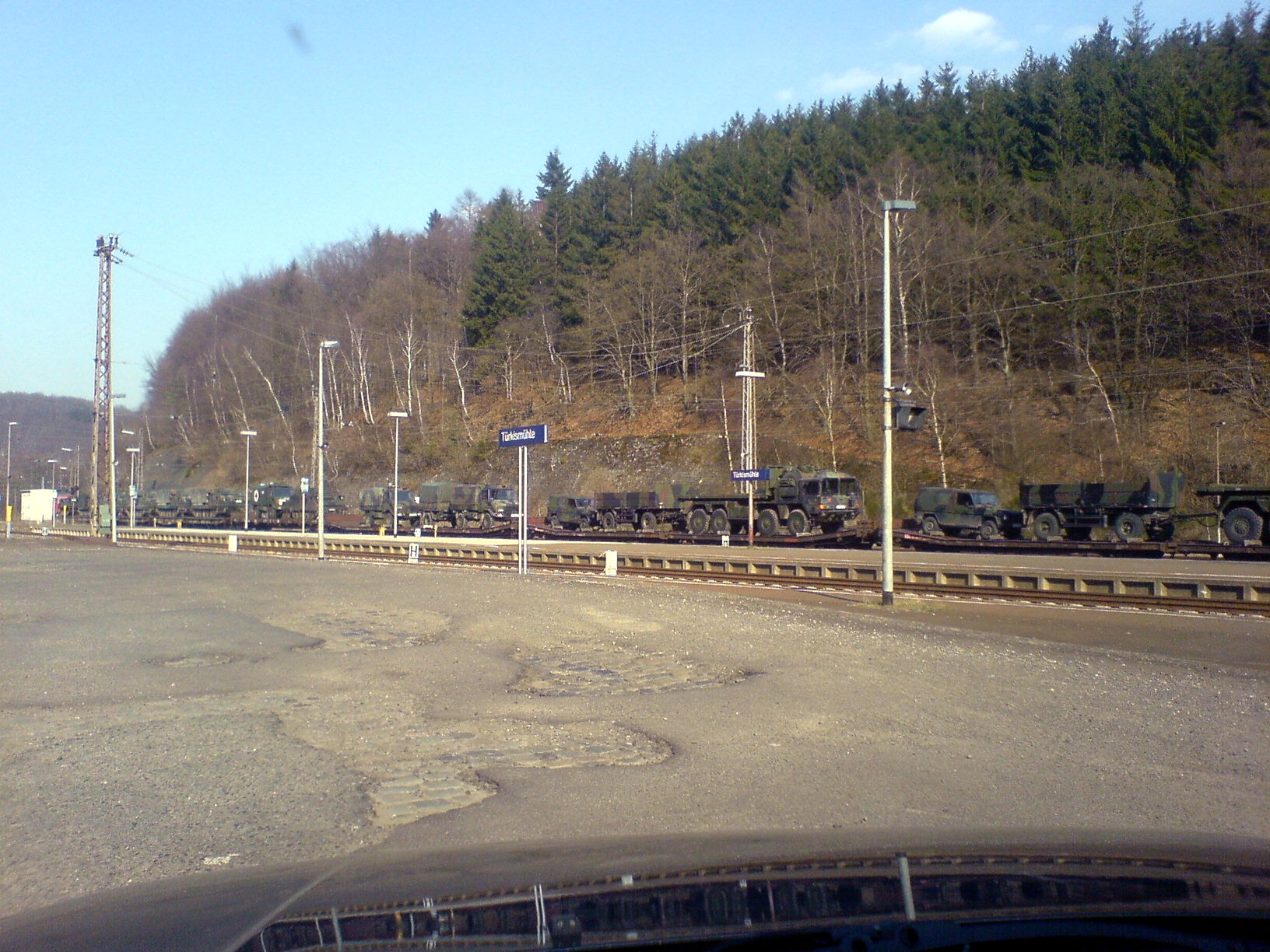 Die Durchfahrt eines Militärzugs nach Baumholder im Bahnhof Türkismühle